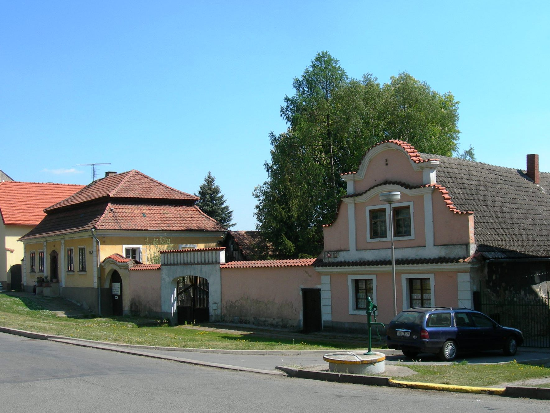 Náves